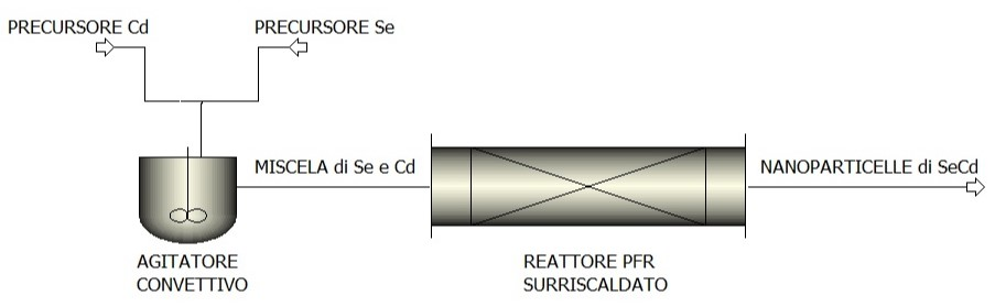 schema di impianto hot injection